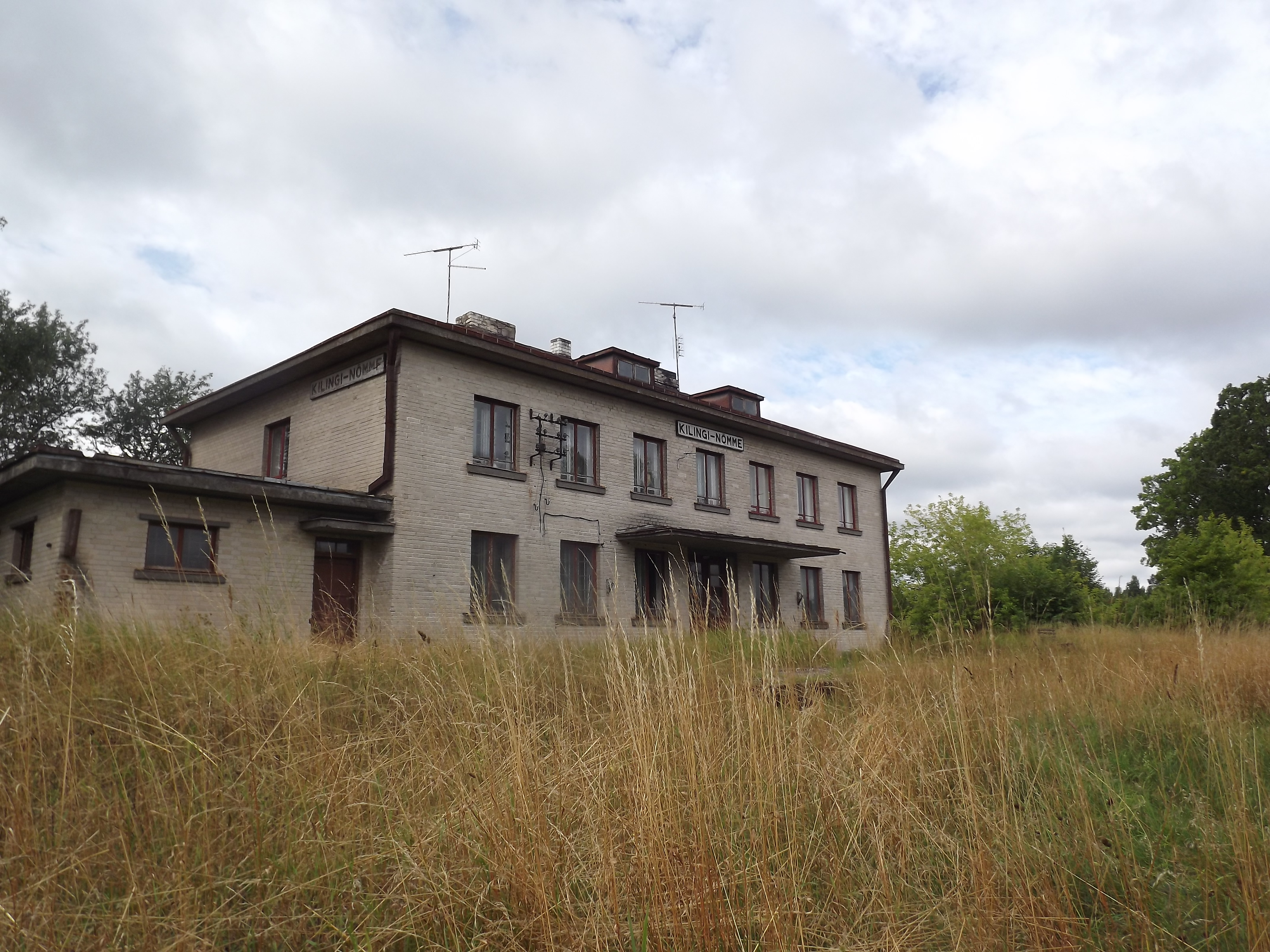 Kilingi-Nõmme jaamahoone